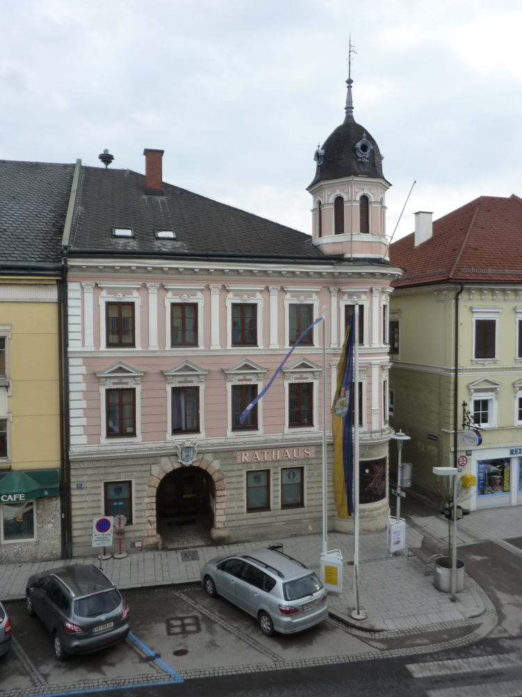 Rathaus Schwanenstadt